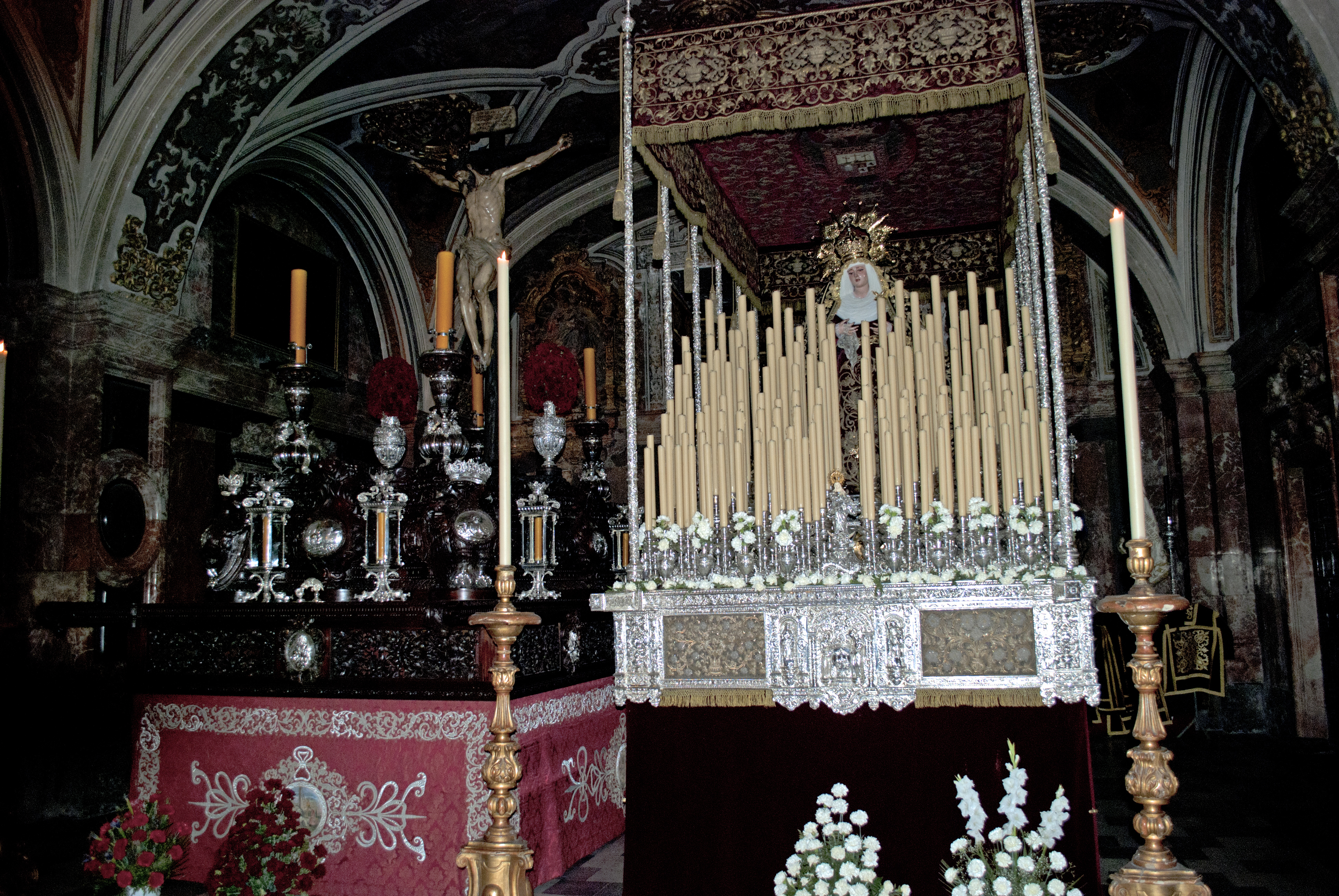 Hermandad del Calvario, Semana Santa de Sevilla.